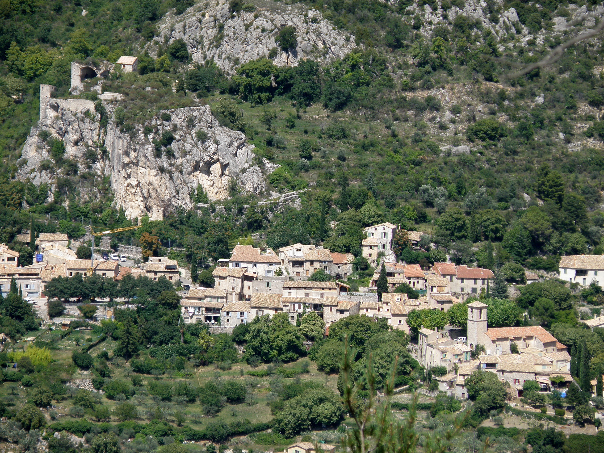 La Roche-sur-le-Buis (Drôme, France). Vue générale du bourg-centre. avec l'église Saint-Christophe en bas à droite, et le château sur son éperon rocheux à gauche.